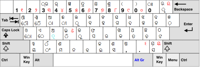 Windowsのオリヤー語キーボード